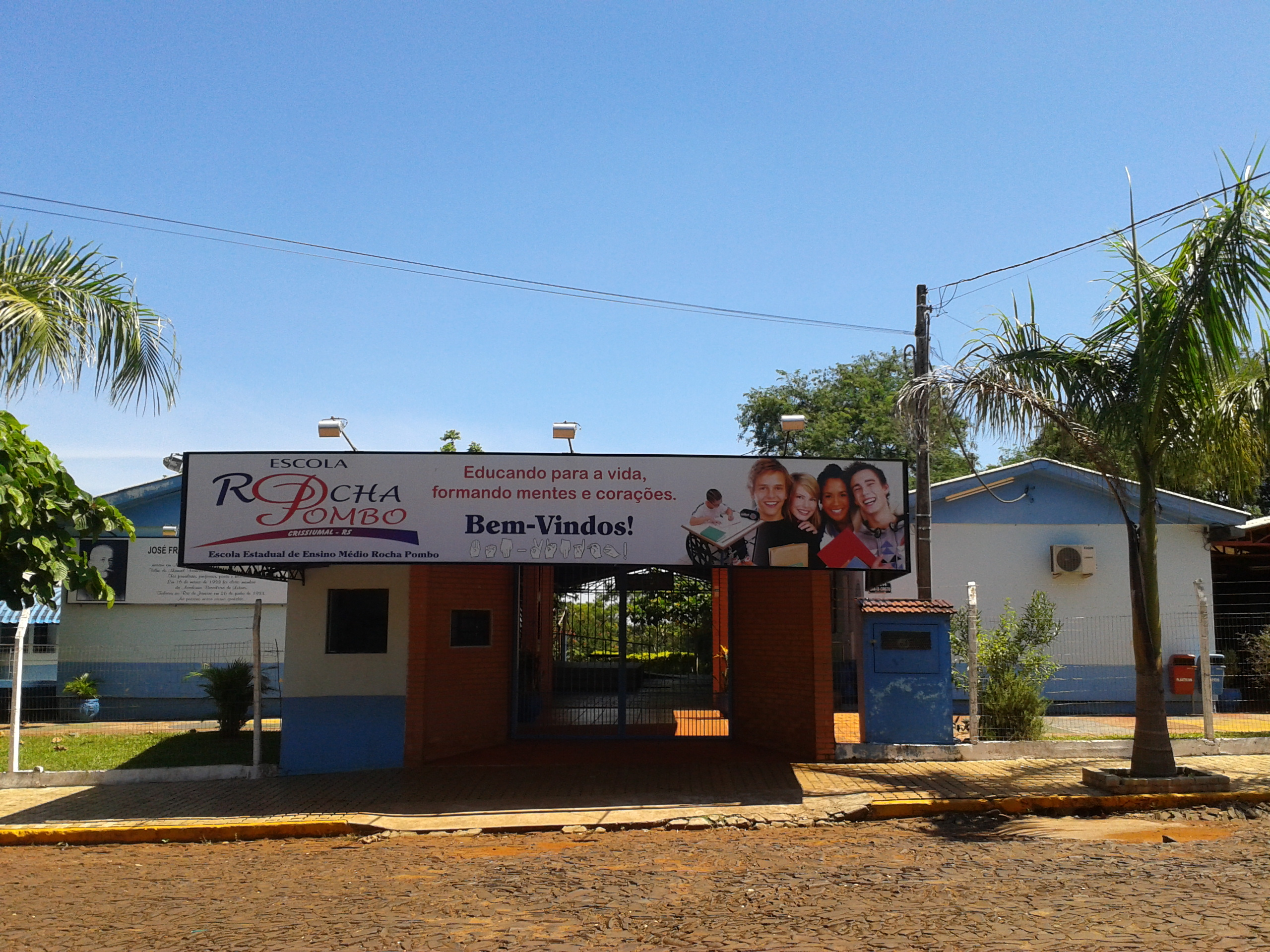 Escola Estadual de Ensino Médio Rocha Pombo em Crissiumal.